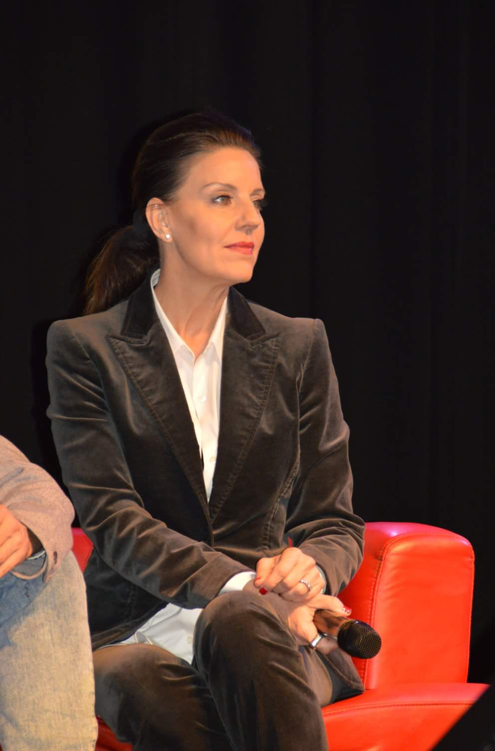 Andrea Parker, Paris Manga 4 fevrier 2018